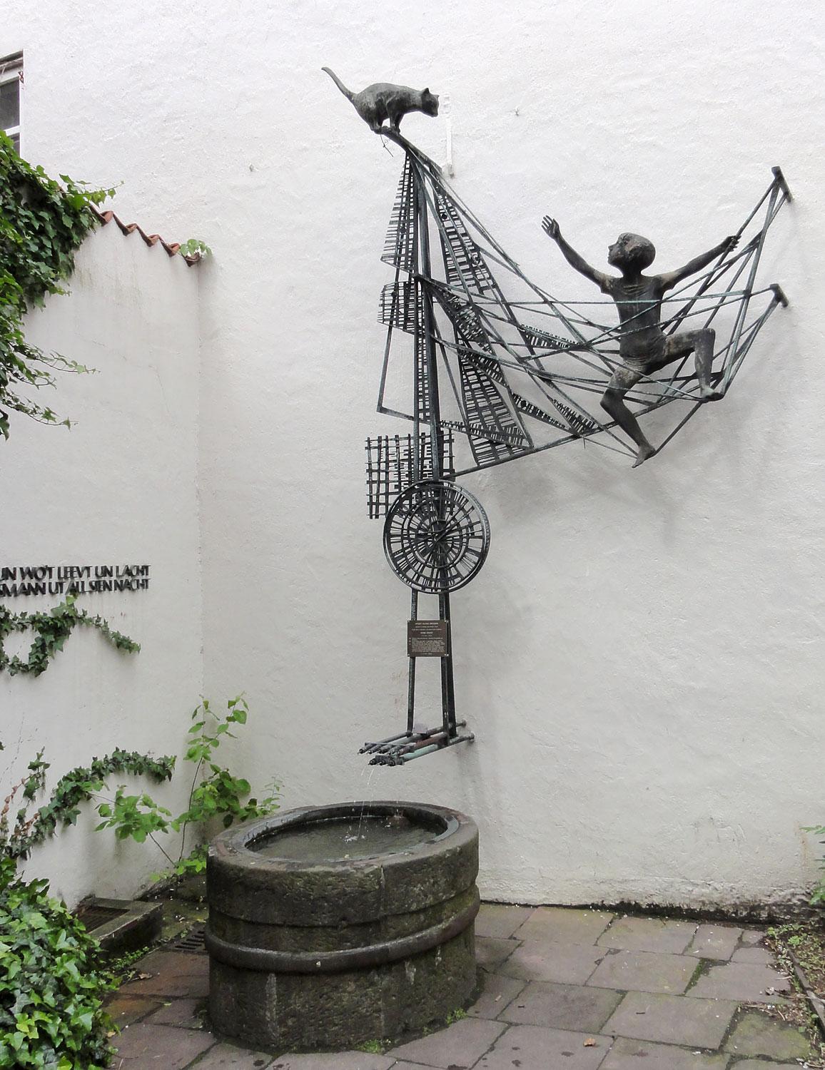 Schnoor Bremen: Ottjen-Alldag-Brunnen. Herstellung: 1963. Bildhauer: Klaus HomfeldDas abgebildete Objekt ist ein geschütztes Kulturdenkmal in der Freien Hansestadt Bremen, mit der Nr. 1370 beim Landesamt für Denkmalpflege registriert.